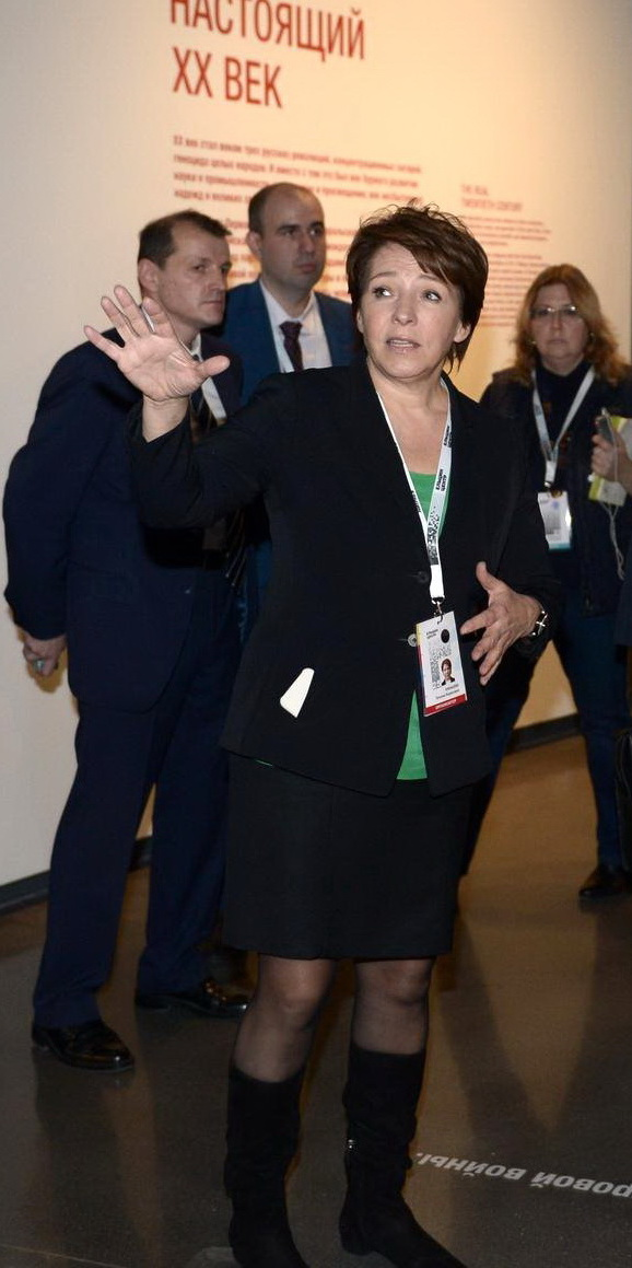 Татьяна Юмашева в Ельцин-центре